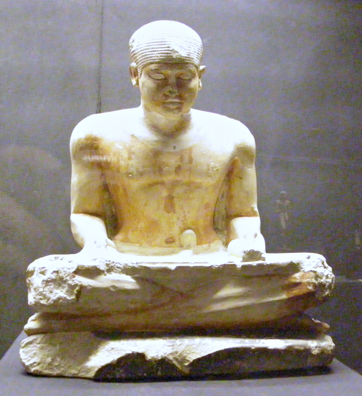 Statue eines Schreibers der 5. Dynastie, Museum bei der Nekropole von Sakkara